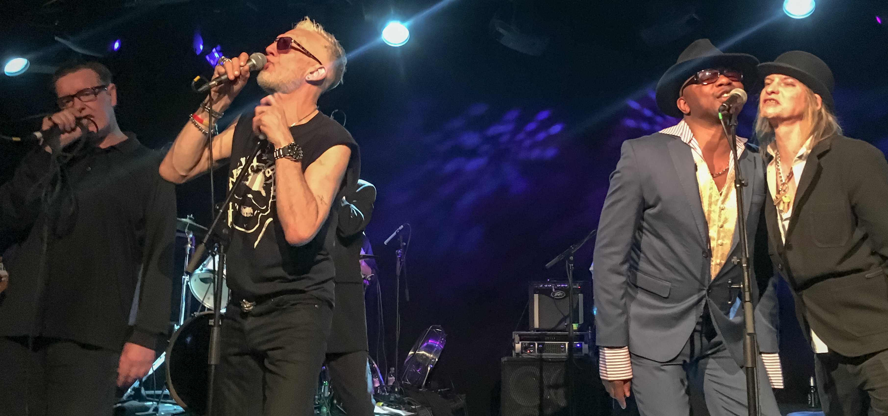 Alabama 3 am 28. April 2017 im Tramshed, Cardiff (v.l.n.r. Jake, Rob, Be, Orlando)